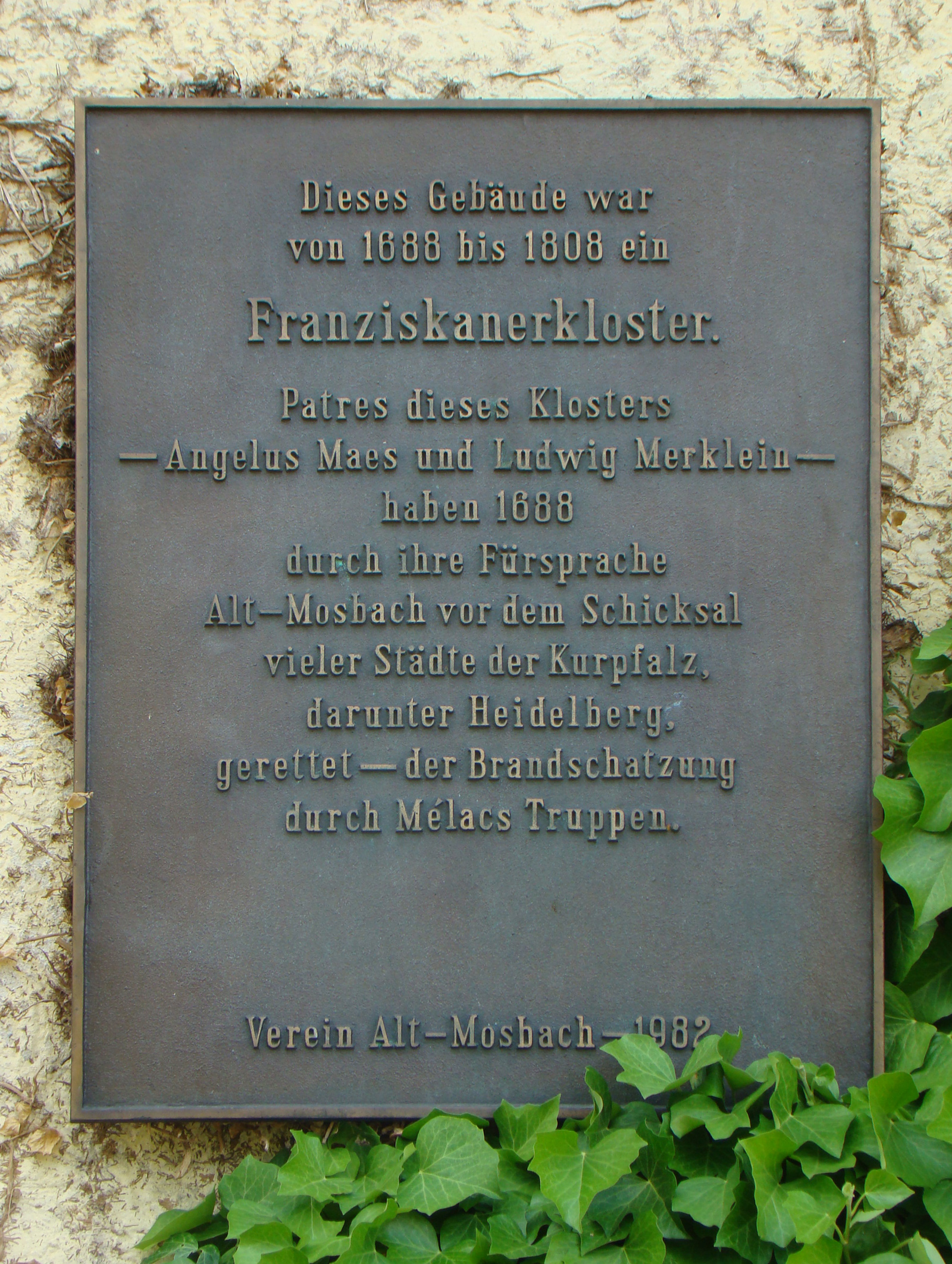 Franziskanerkloster Mosbach: Gedenktafel am Gerichtsgebäude